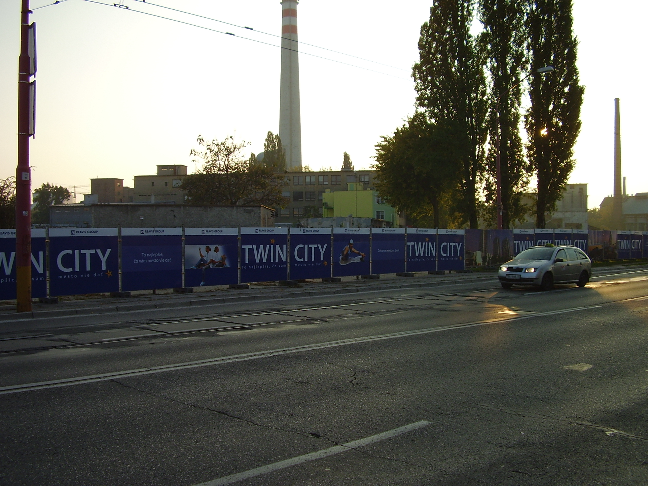 Miesto, kde kedysi stáli výrobné haly Kablo.